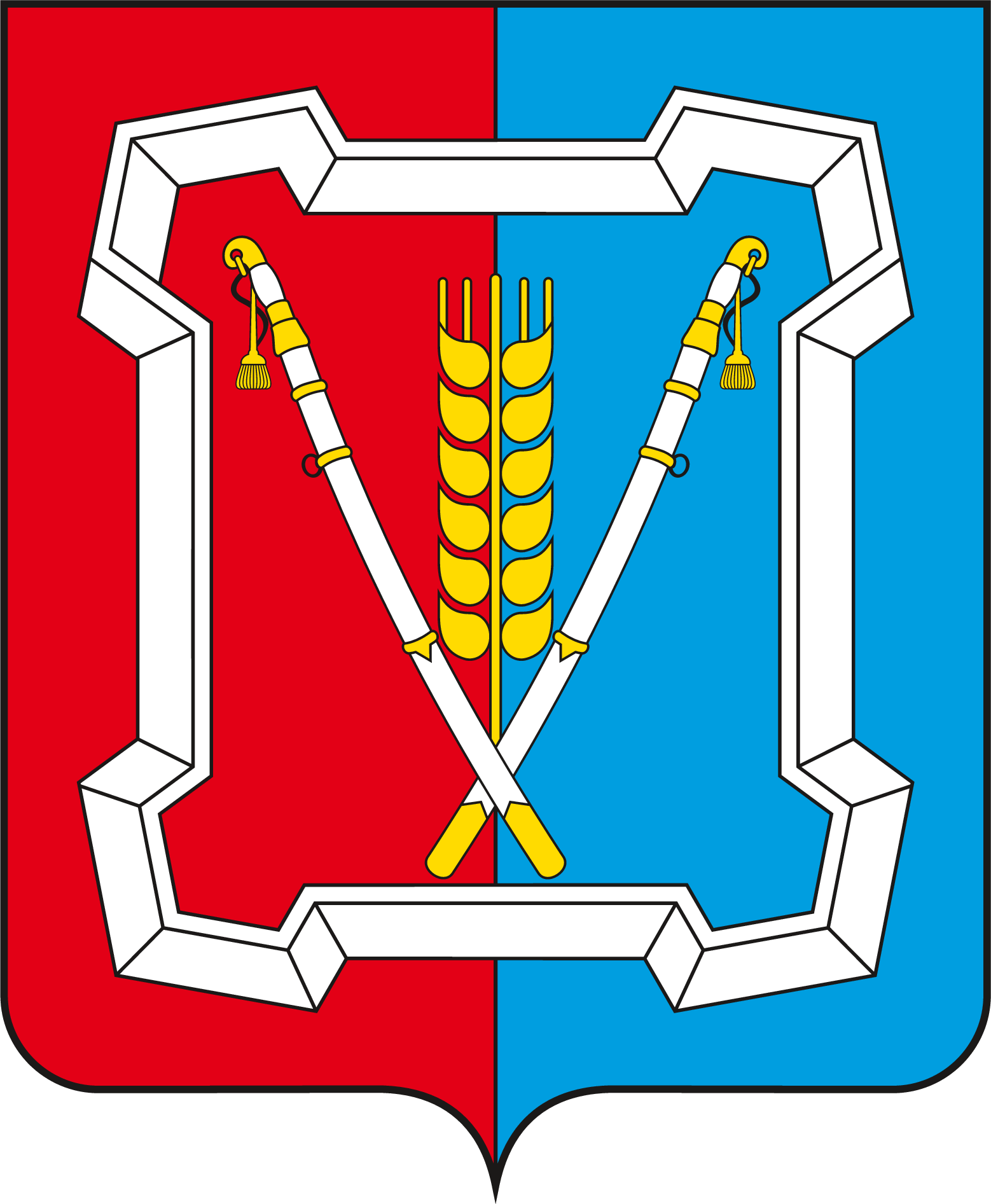 Герб Курского района